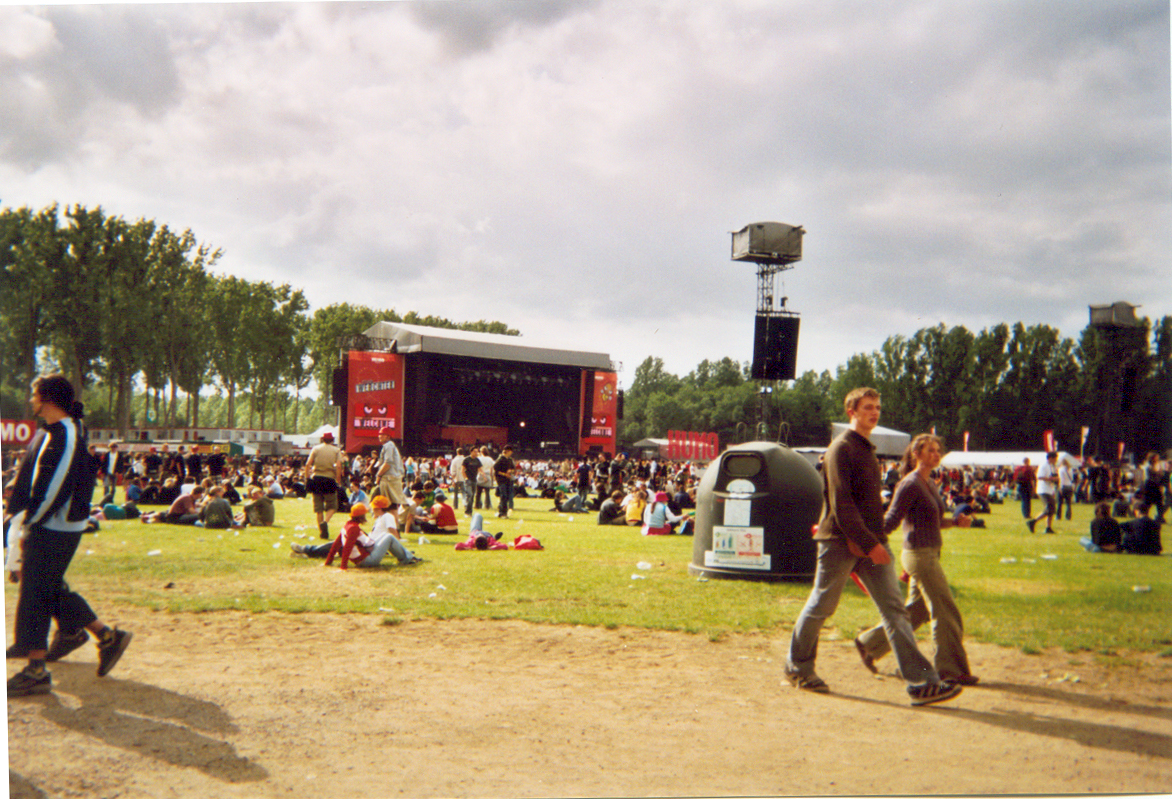 Festival Rock Werchter (2004) Photo de Virginie Couture.